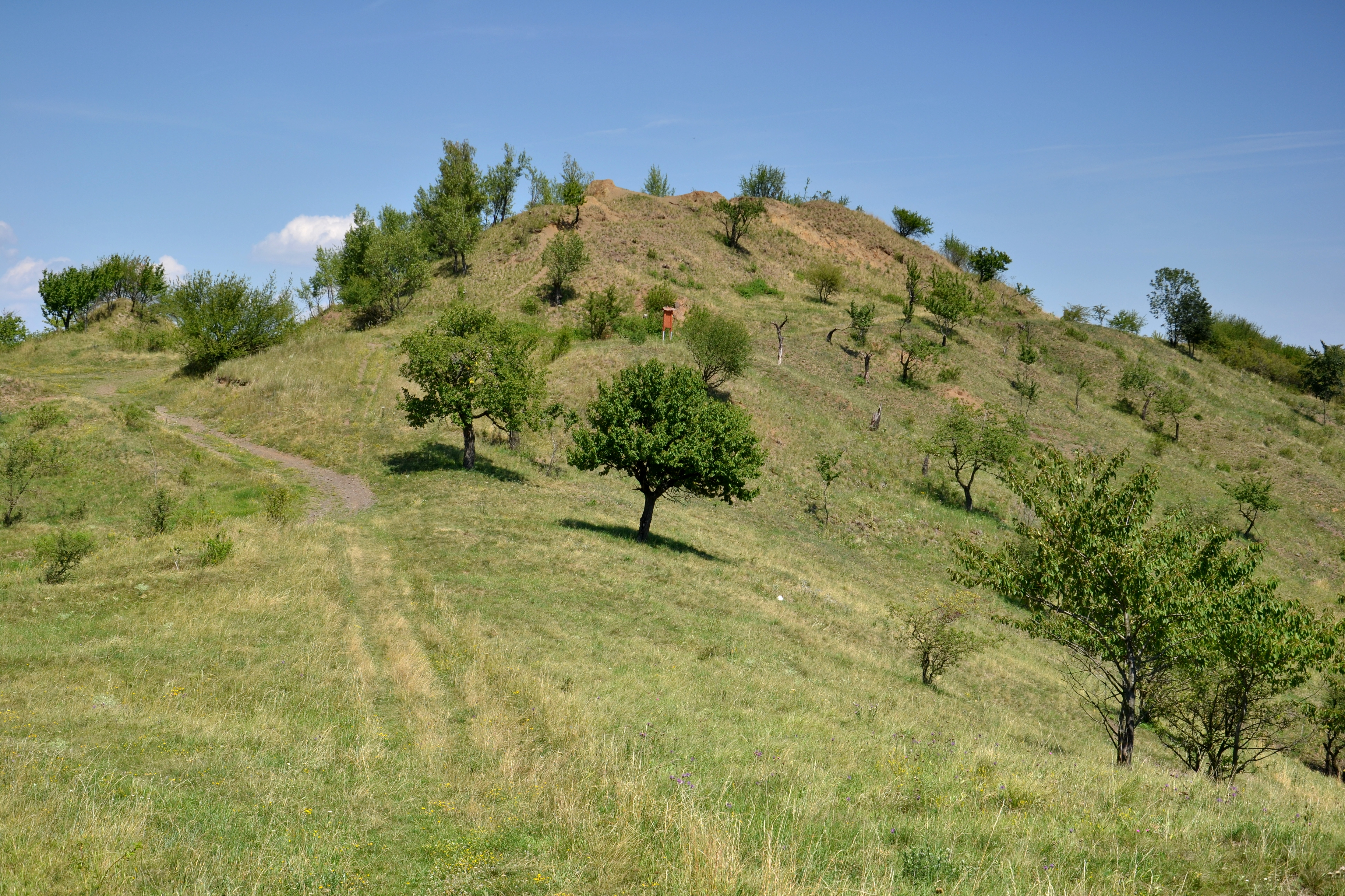 Blšanský chlum – celkový pohled z Malého chlumu na jihozápadě